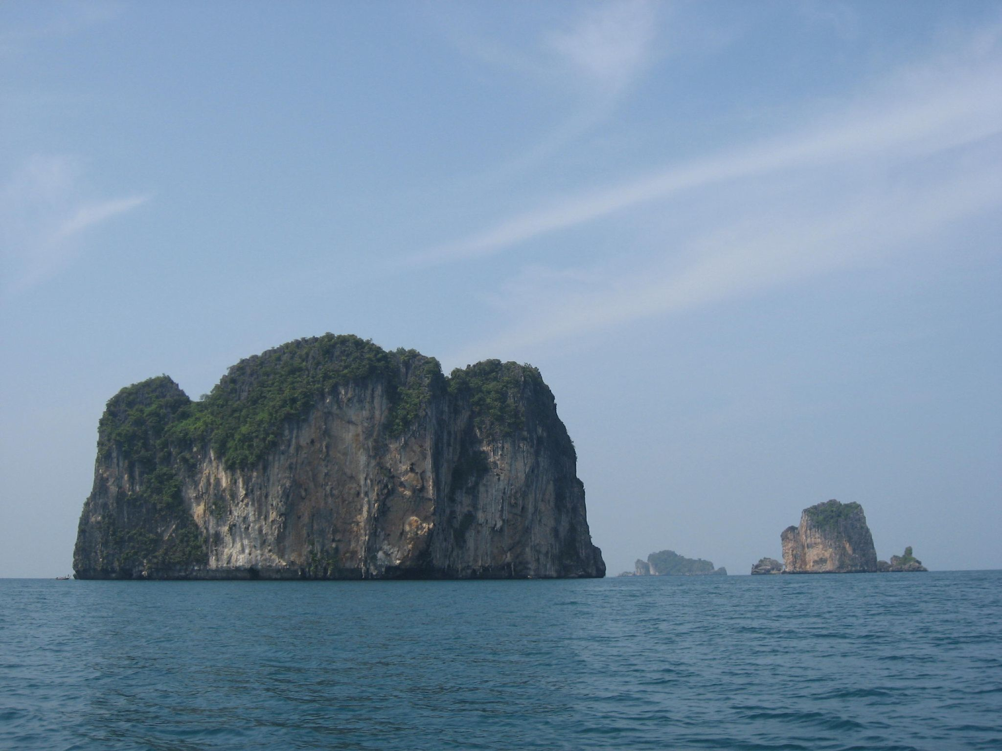 Andaman Islands